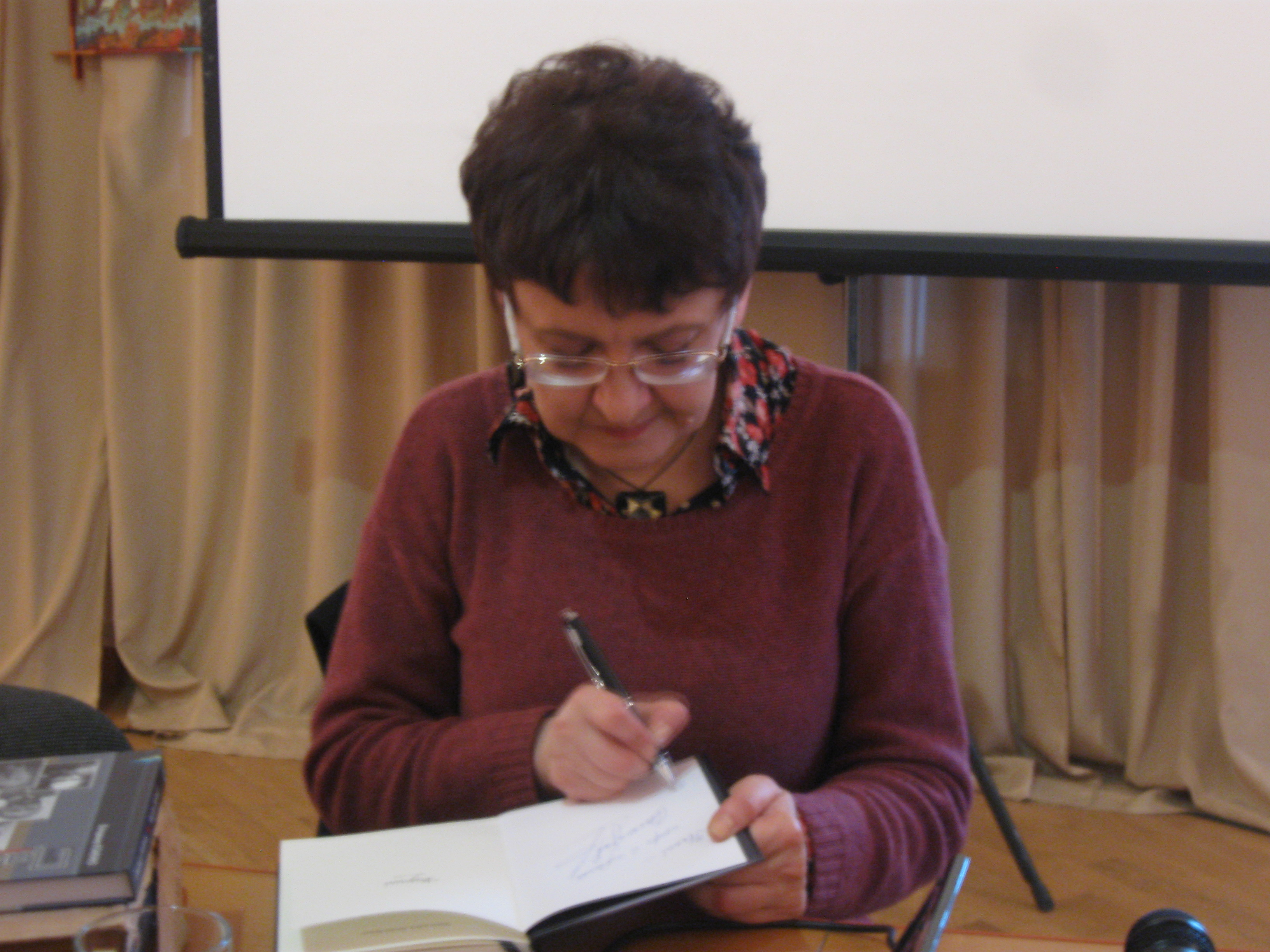 Оксана Забужко підписує книгу